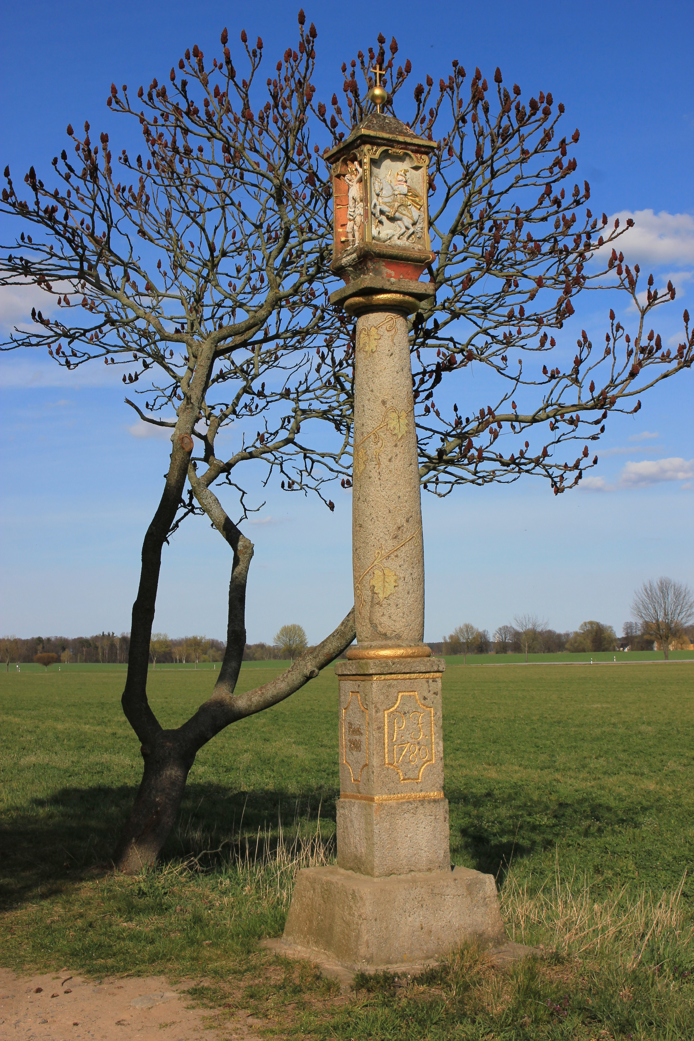 Hornjoserbsce: Modlerski stołp pola Hornjeho Hajnka